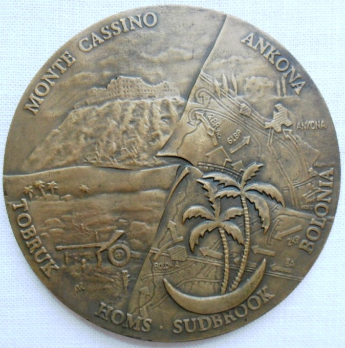 Pamiątkowy medal Pułku Ułanów Karpackich